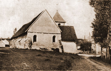 Lindry (Yonne) - église vers 1900.